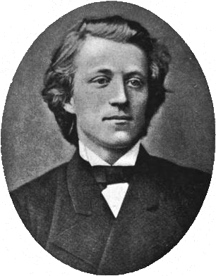 John Paulsen (1851–1924) som ung mann.